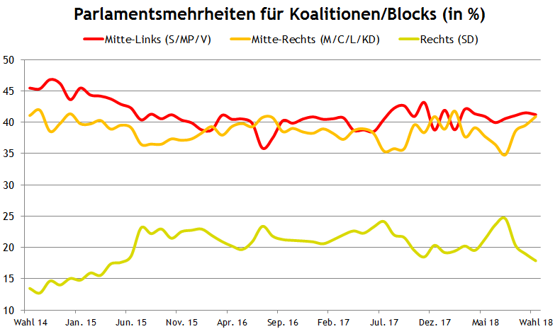 Schweden Blocks